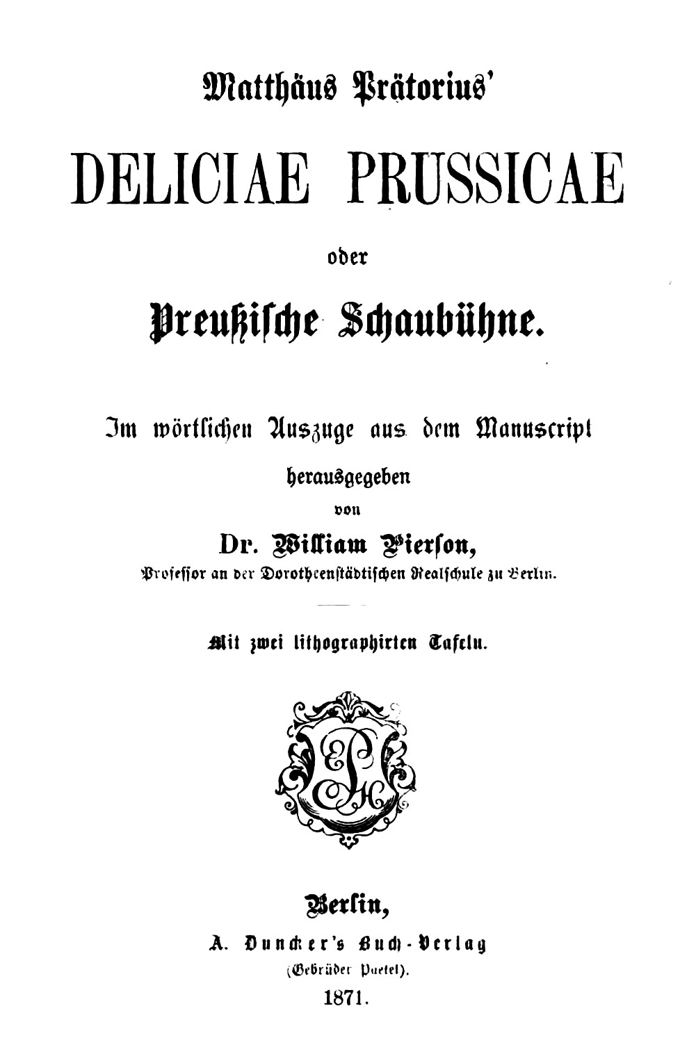 Titelblatt des (auszugsweisen) Erstdrucks von Matthäus Prätorius' umfangreicher ethnografischer Schrift über die Pruzzen und Litauer seiner Zeit und Region